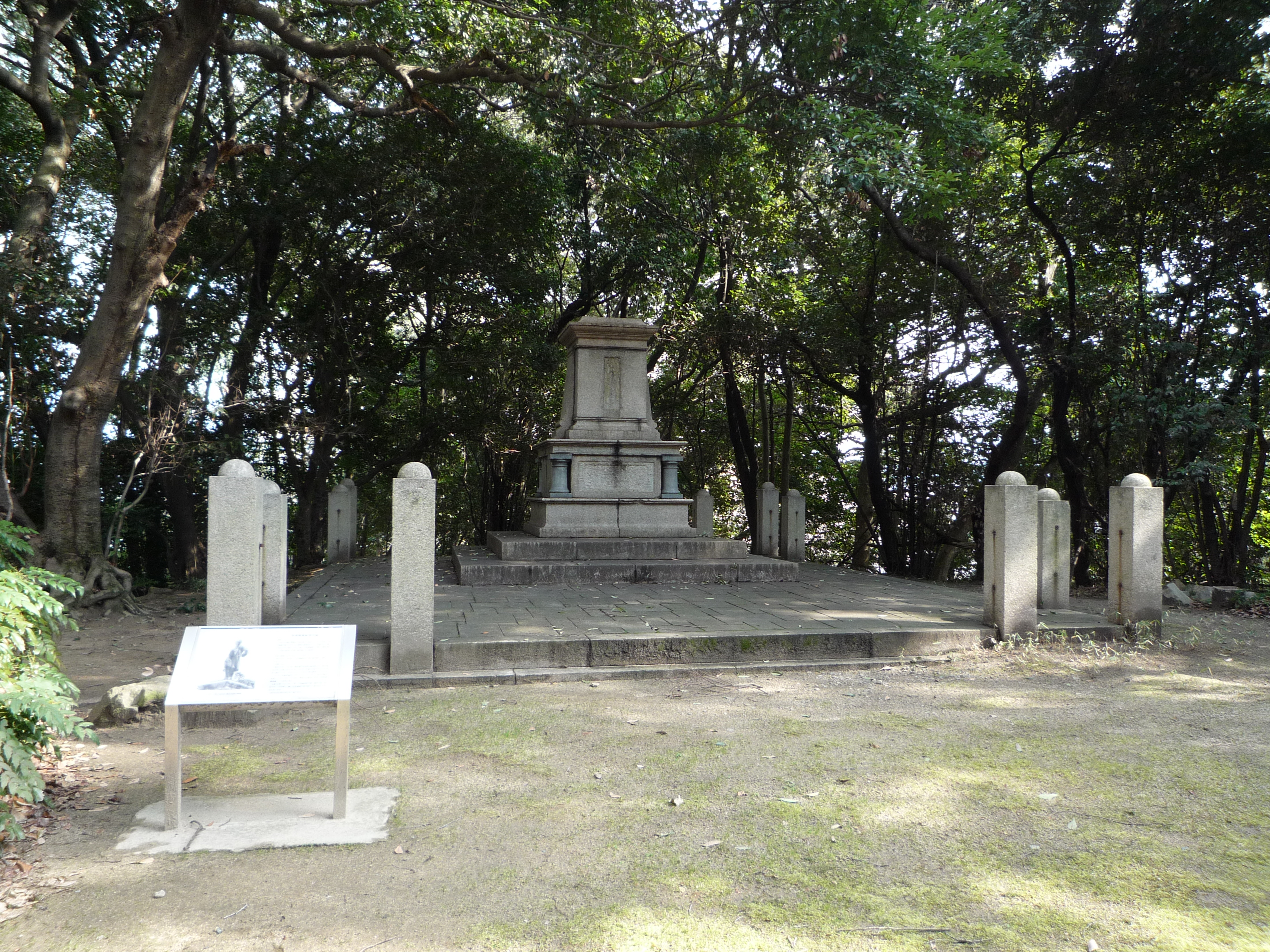 早速整爾碑跡